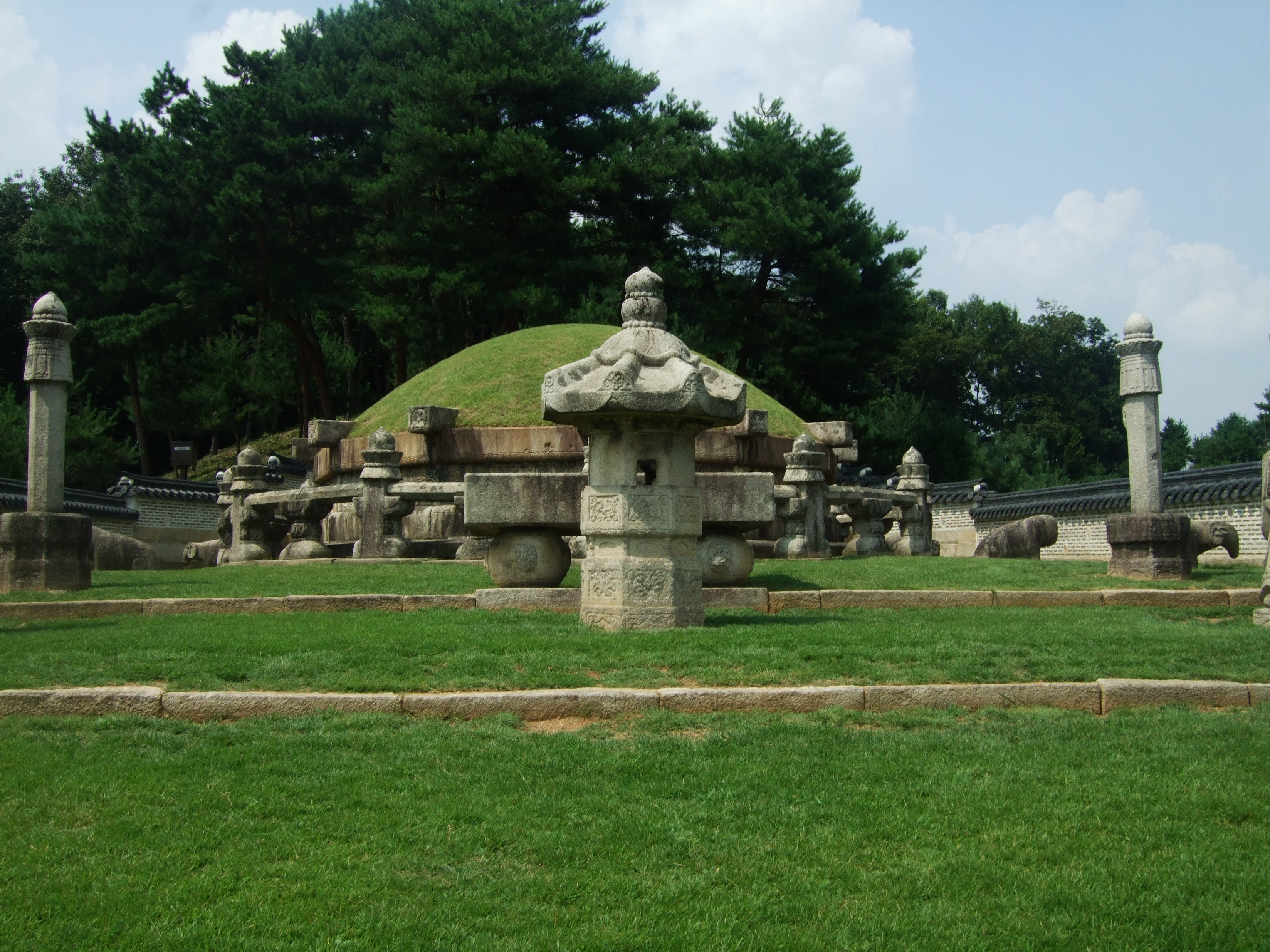 조선 선조과 정비 의인왕후, 계비 인목왕후의 능 (사진은 선조의 능상)